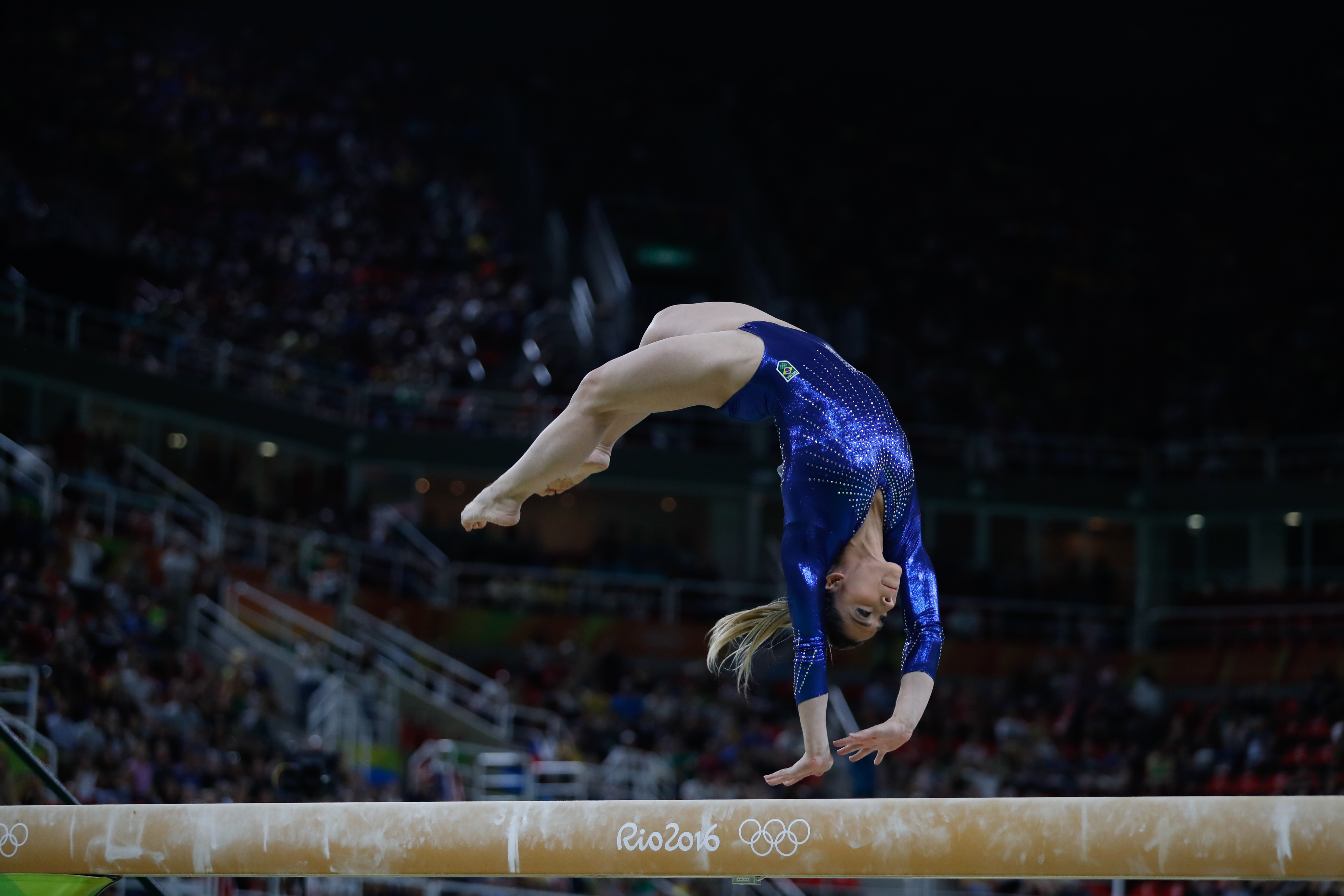 Rio de Janeiro - Danieler Hypolito durante final por equipes da ginástica artística feminina nos Jogos Olímpicos Rio 2016, em que o Brasil terminou em 8º lugar. (Fernando Frazão/Agência Brasil)